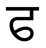 пхаппха